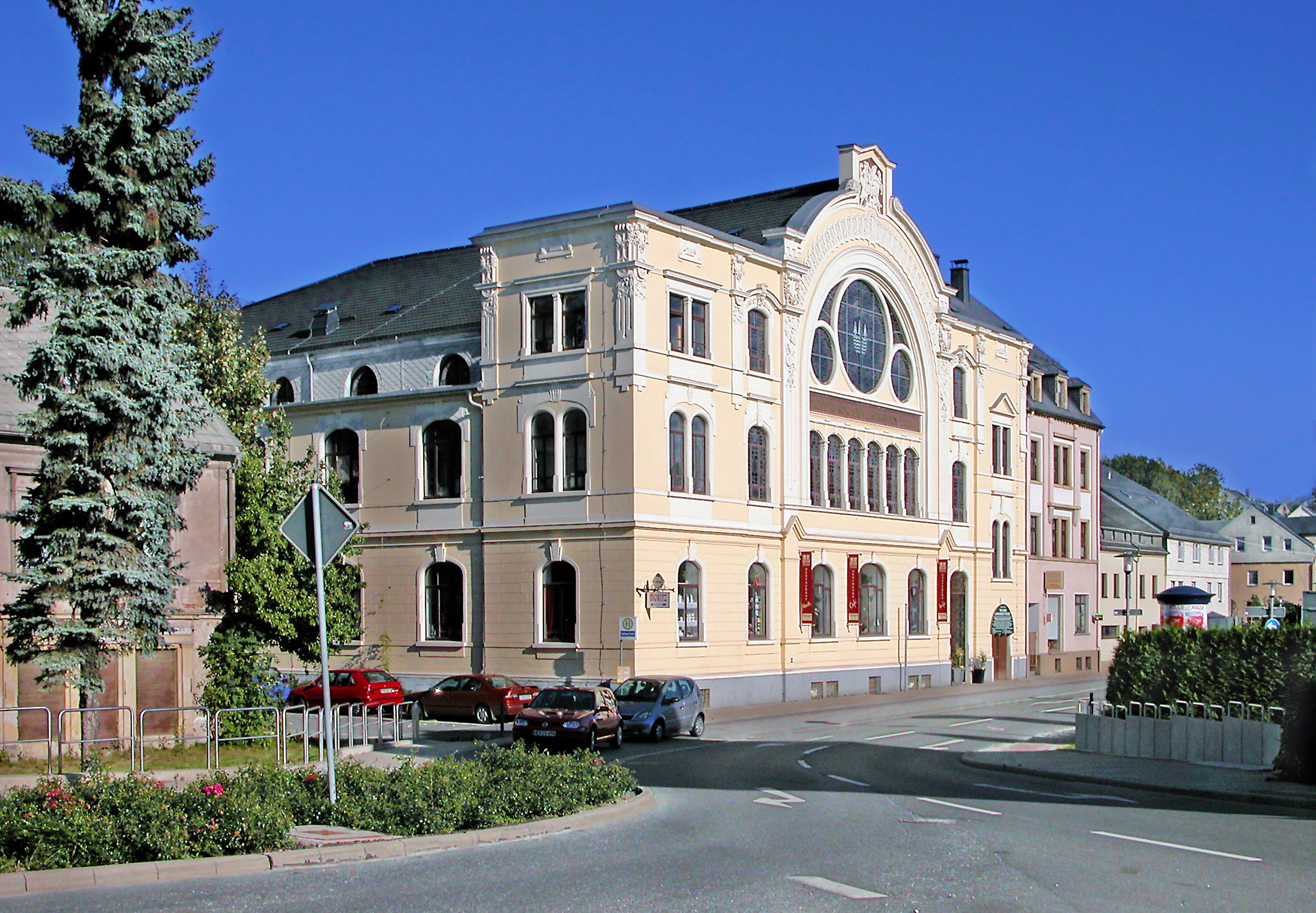 23.09.2006 09526 Olbernhau: Das Tivoli an der Gerbergasse (GMP: 50.661698,13.337546). Nach Brand des Vorgängerbaues 1906 von Baumeister Gustav Neubert im selben Jahr nach eigenen Entwürfen wieder errichtet. [DSCN11527.TIF]20060923140DR.JPG(c)Blobelt